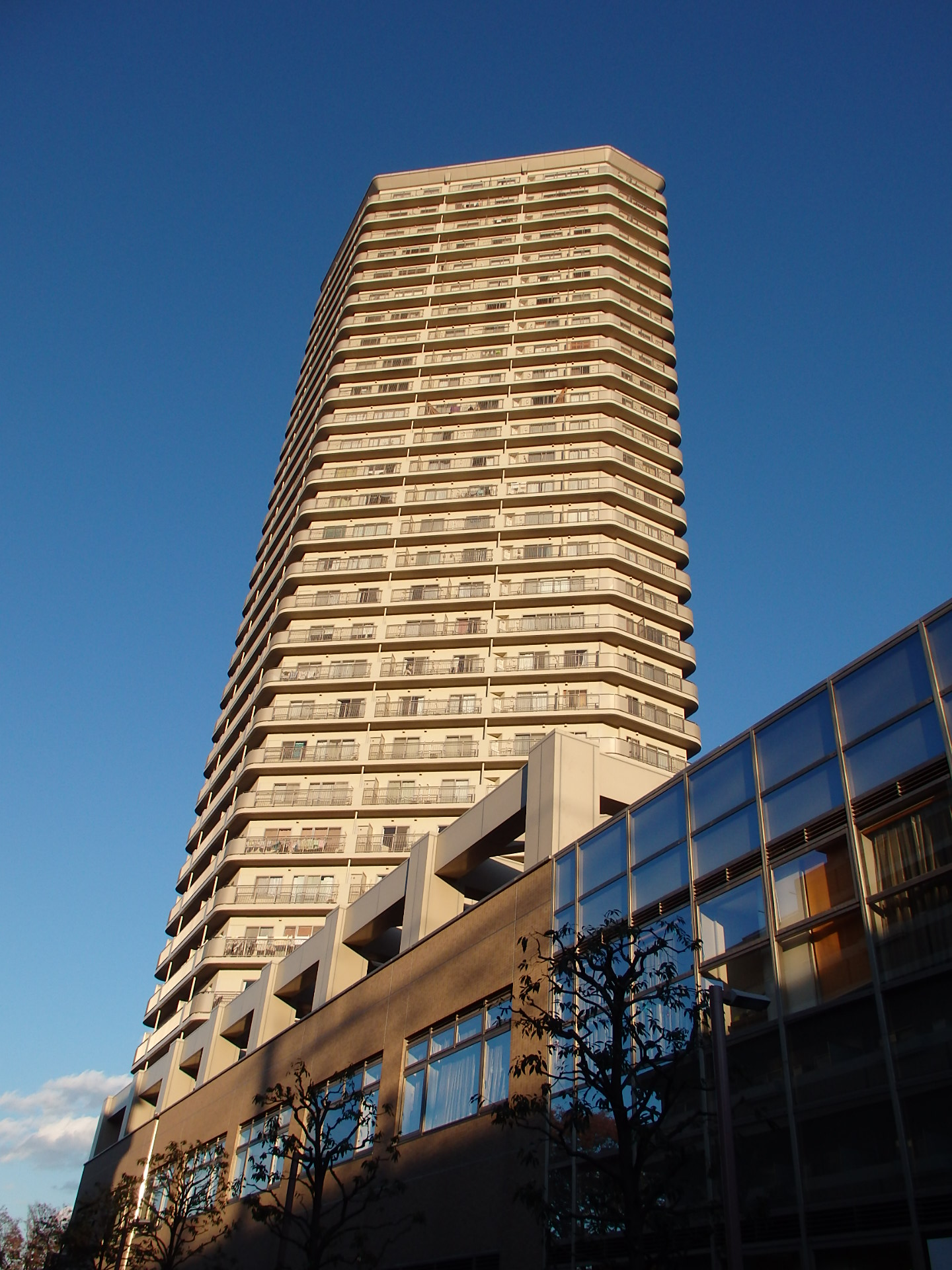 アイ・タワー